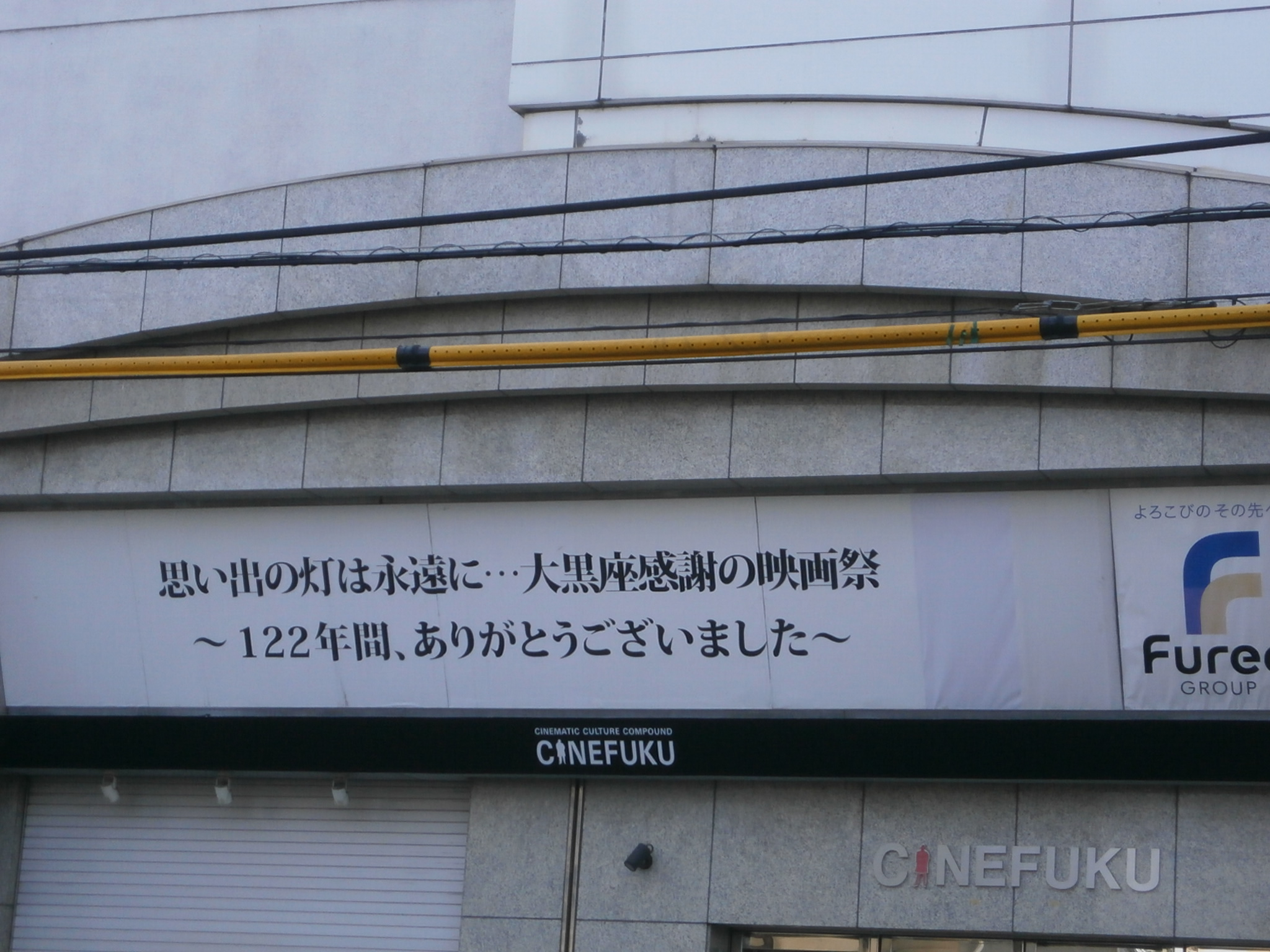 広島県福山市にあったシネフク大黒座の外観。2014年に閉鎖された。